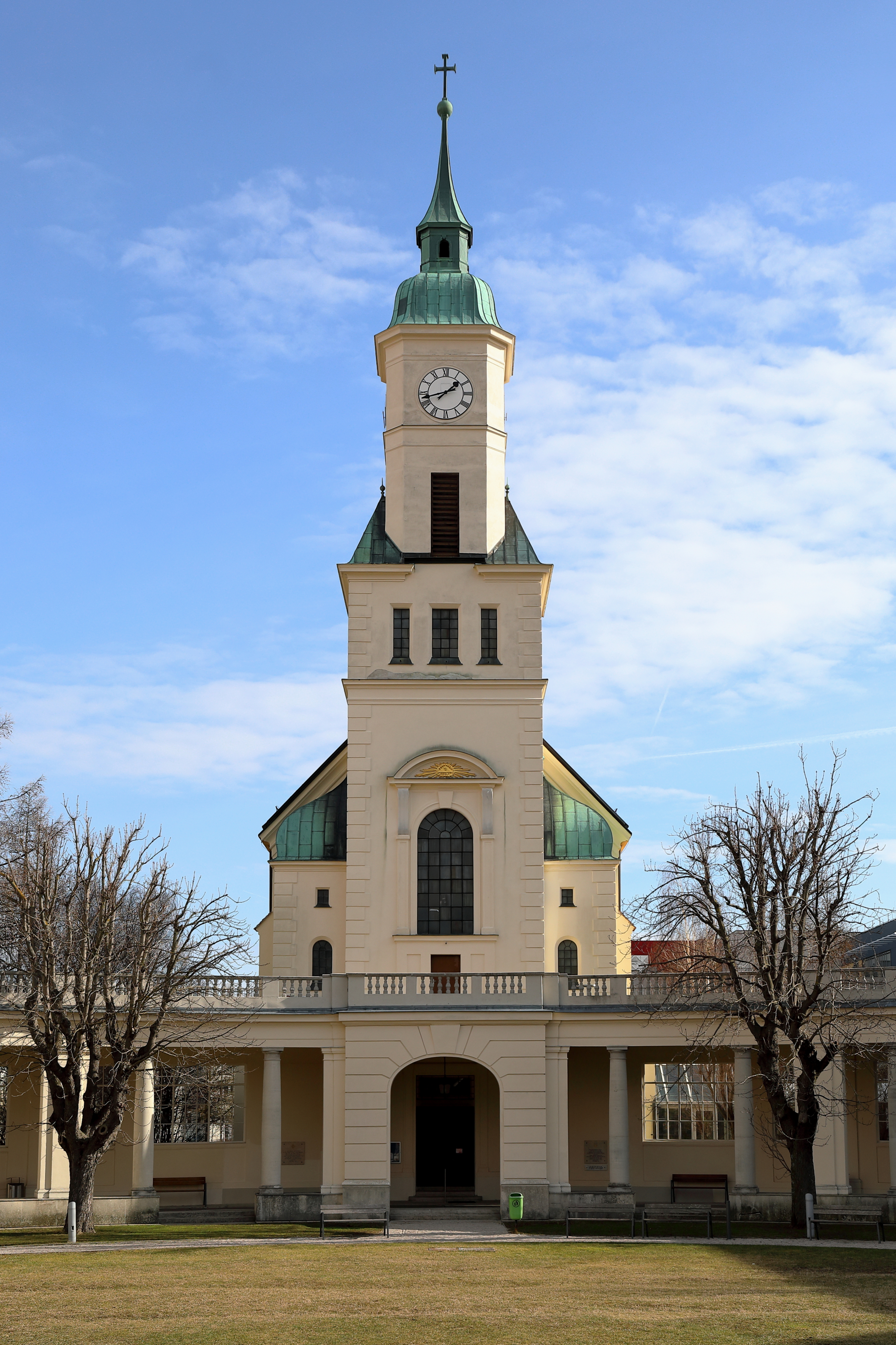 Spitalskirche des Orthopädischen Spitals Speising im 13. Wiener Bezirk Hietzing. Die dem hl. Josef geweihte Kirche wurde ursprünglich als Teil einer Waisenhausanstalt von 1908 bis 1912 von den Schulbrüdern errichtete.